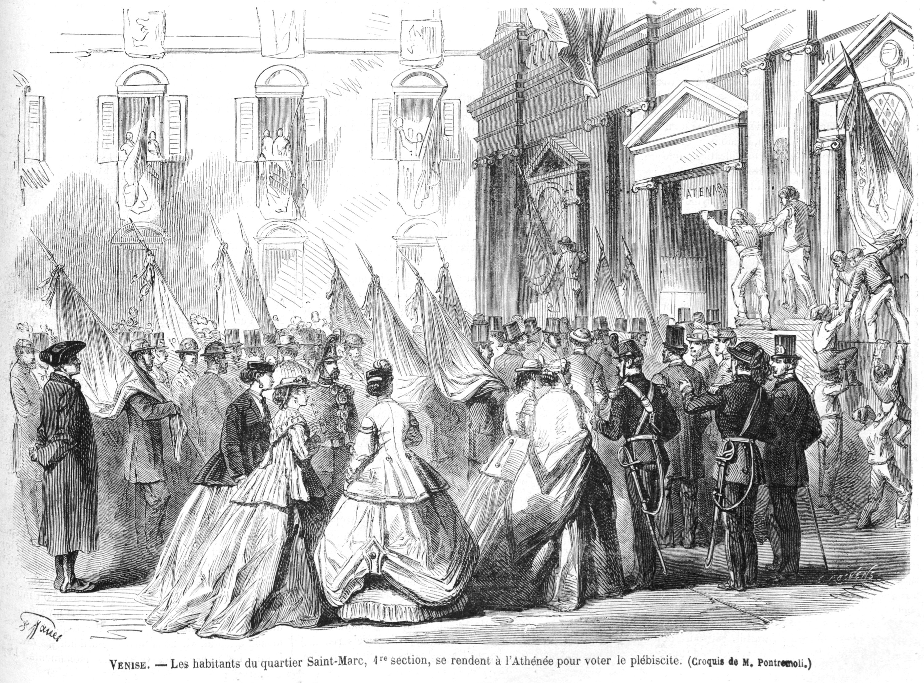 Votazioni a Venezia per il plebiscito di annessione al Regno d'Italia